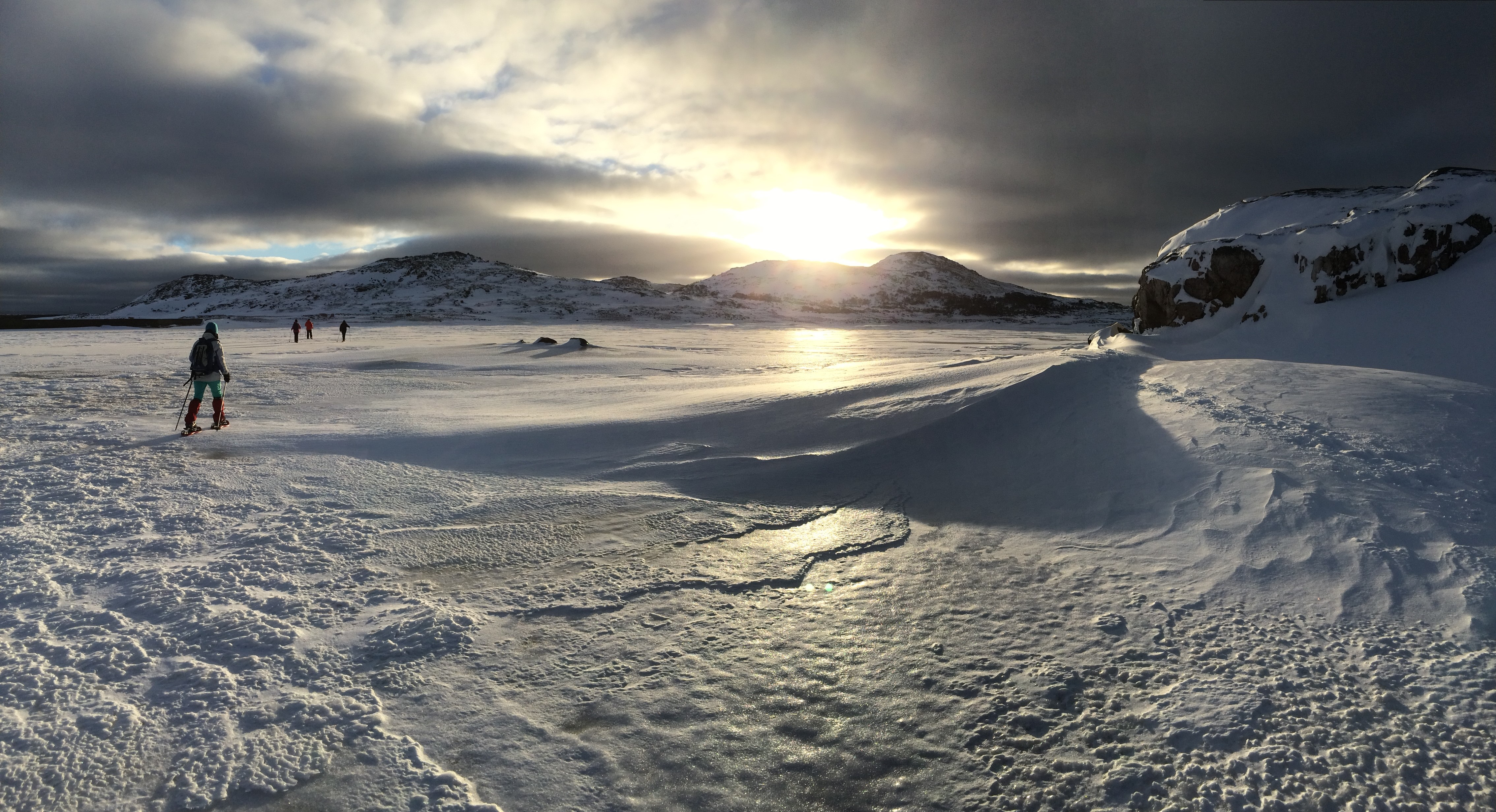 Étang de la Vigie gelé sur l'île de Saint-Pierre, à Saint-Pierre-et-Miquelon.Cette photo a été la photo gagnante du concours "Photographiez les outre-mer", catégorie Patrimoine immatériel, en 2019 et a été exposée lors des journées du Patrimoine à l'hôtel Montmorin, qui abrite le ministère des Outre-mer.